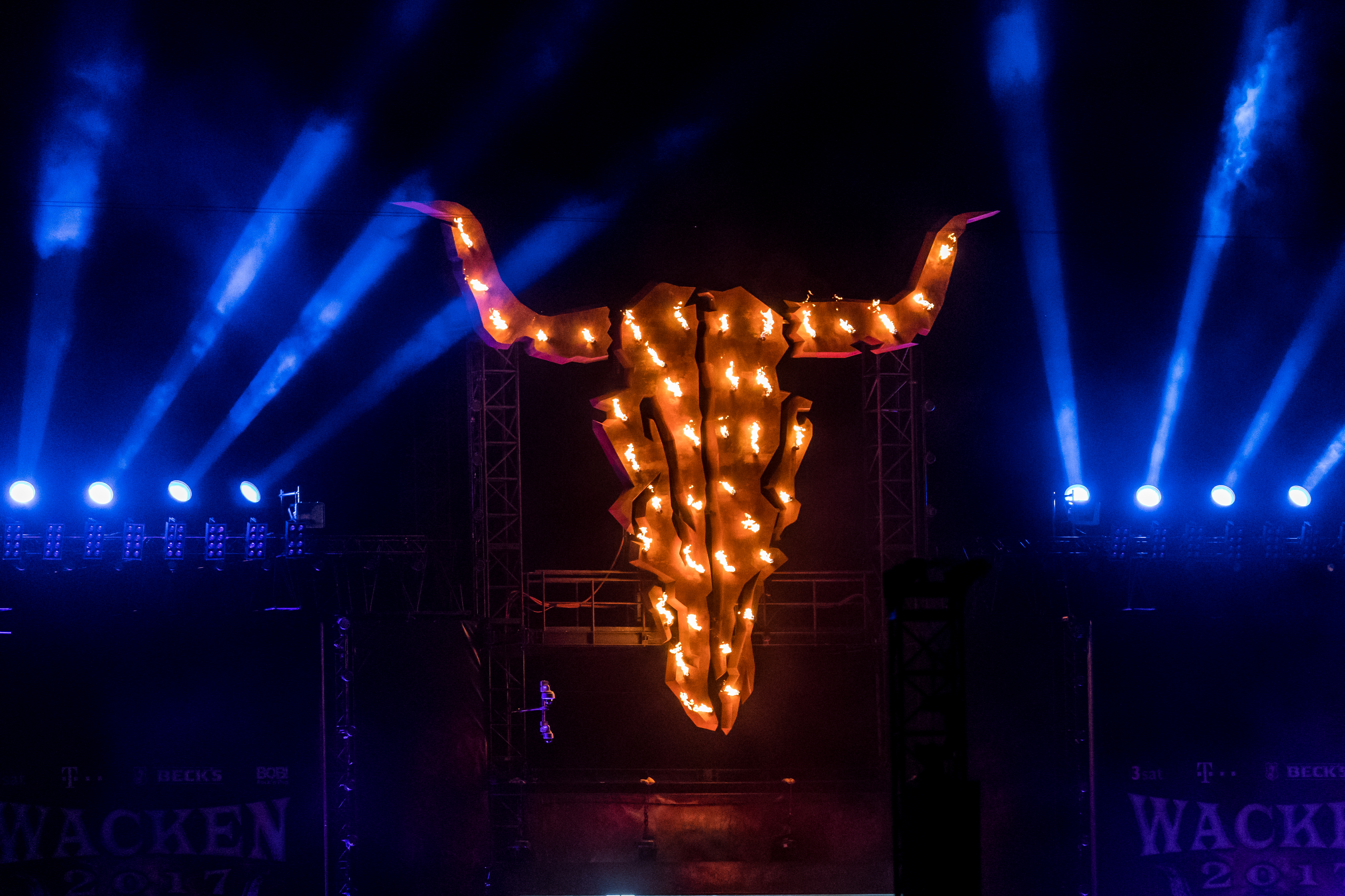 Festivalgelände during Wacken Open Air at Schleswig-Holstein, Wacken, , Germany on 2017-08-03, Photo: Sven Mandel